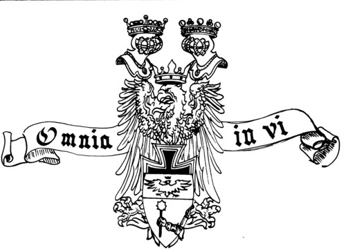 STEMMA con motto di un Ramo della Famiglia